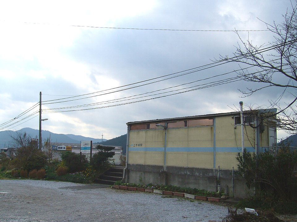 上宇和駅